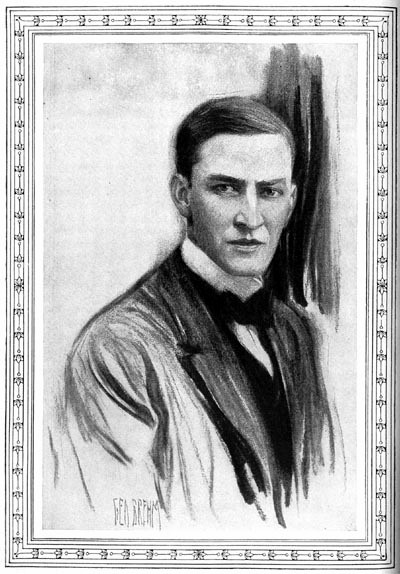 George Ade - Project Gutenberg eText 19325